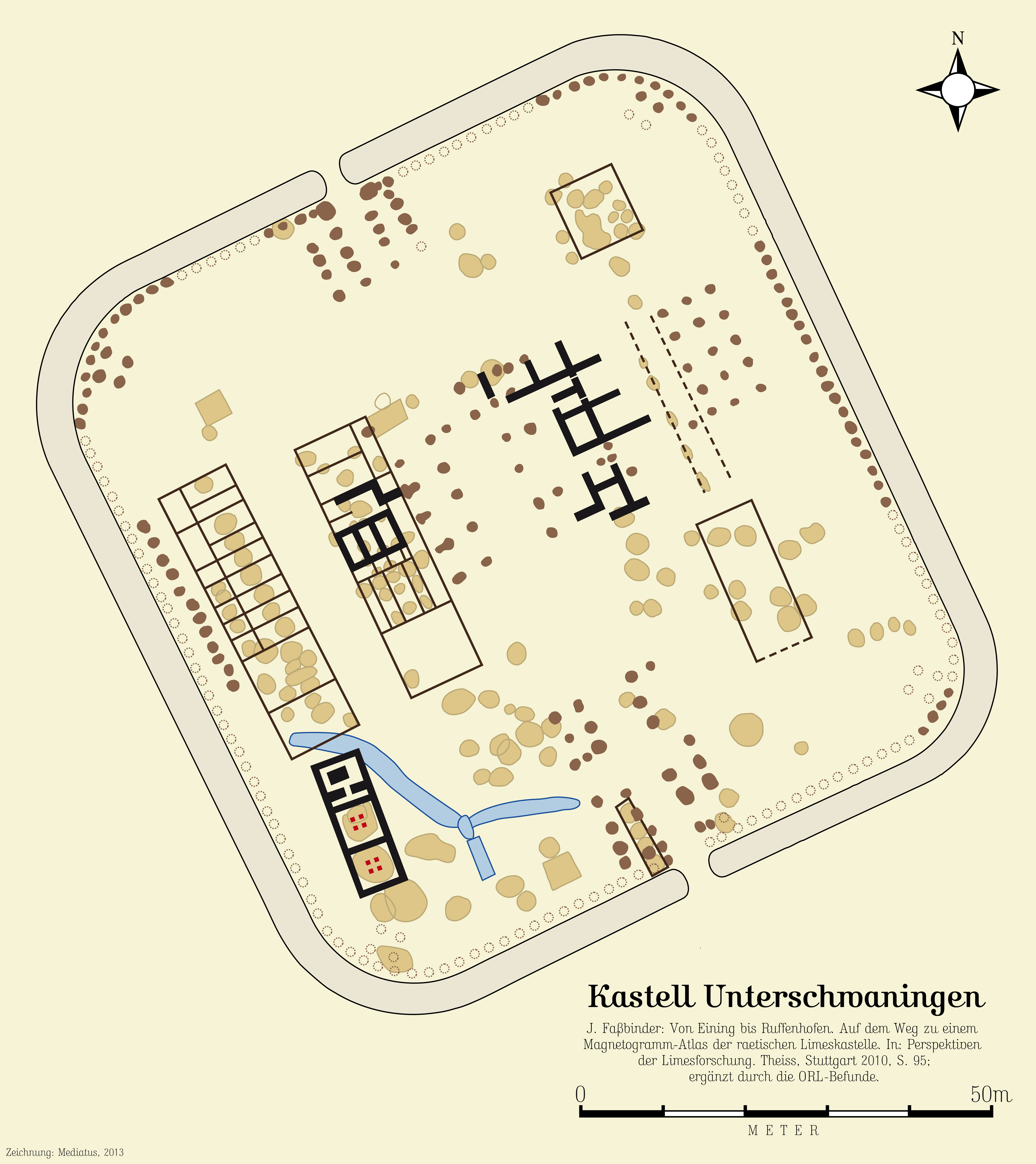 Unterschwaningen nach dem korrigierten Befundplan der Reichs-Limes-Kommission sowie der 2010 veröffentlichten Magnetometerabtastung. Die Quelle ist in der Datei direkt angegeben!